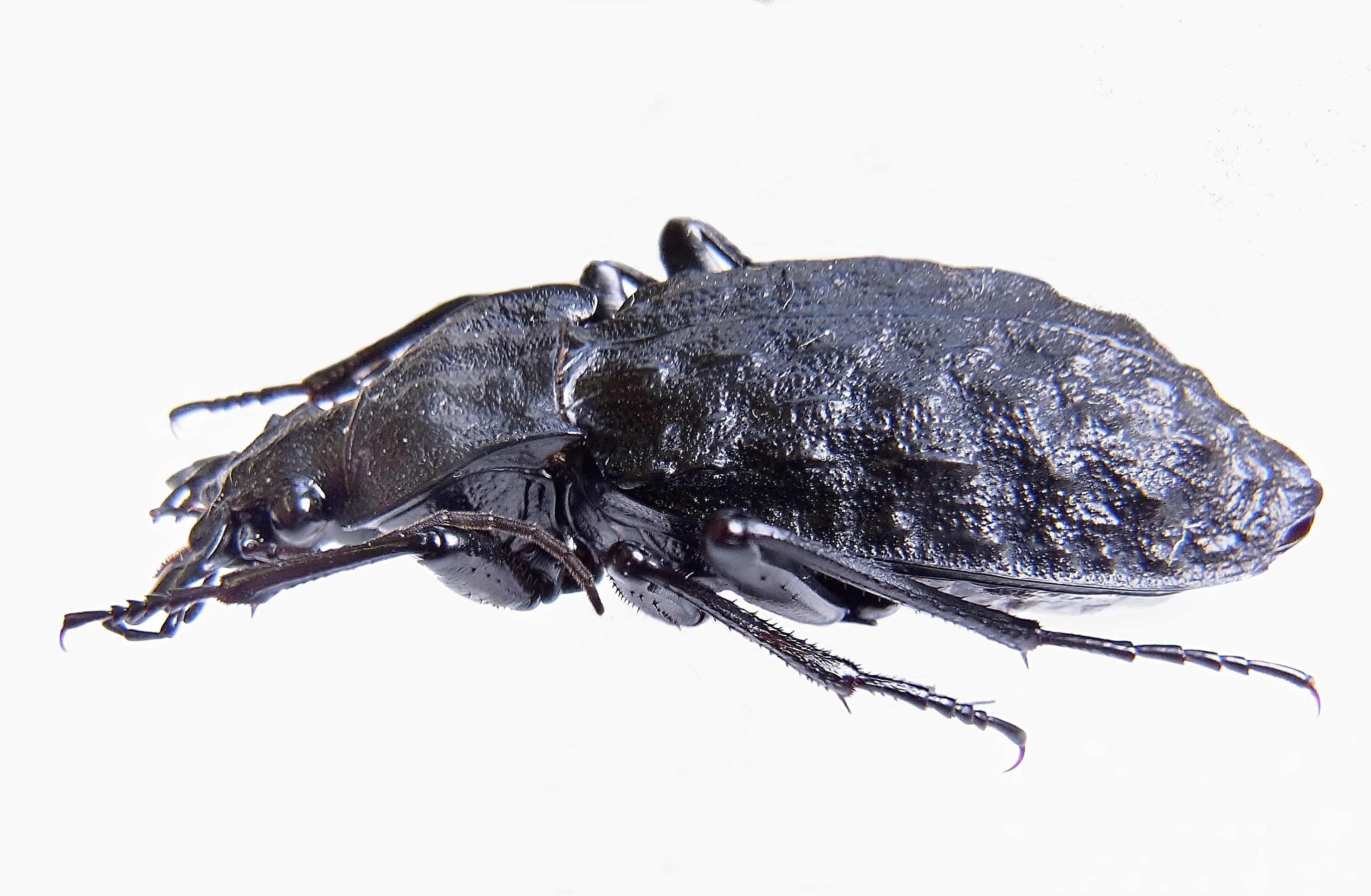 Carabus nodulosus from Hungary, Bakony-Bergland, nahe Zirc, aus der Sammlung desMuseums Zirc, Zettel wegretuschiert